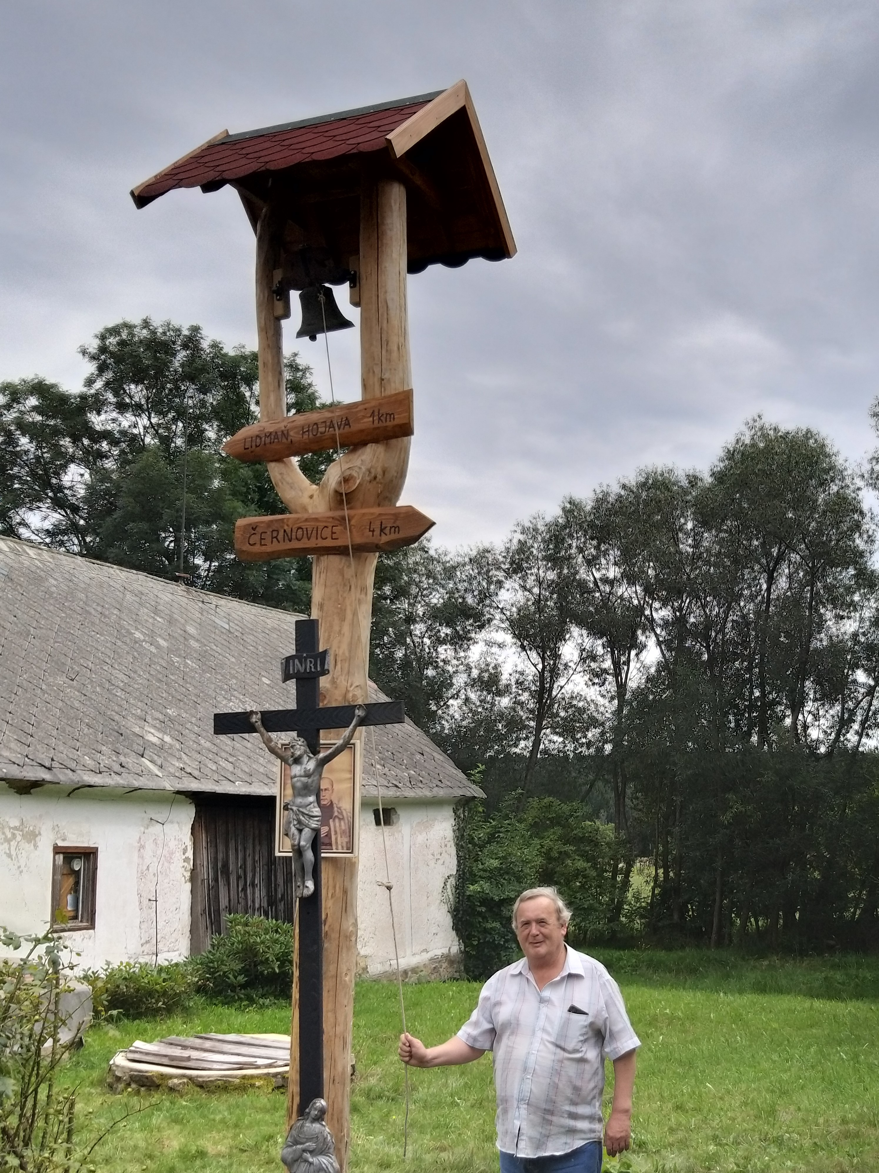 Tradice povolání zvoníků se v rodině dědila. Stejně tak tomu bylo například v rodině Babčických na Bohutíně v okrese Pelhřimov.